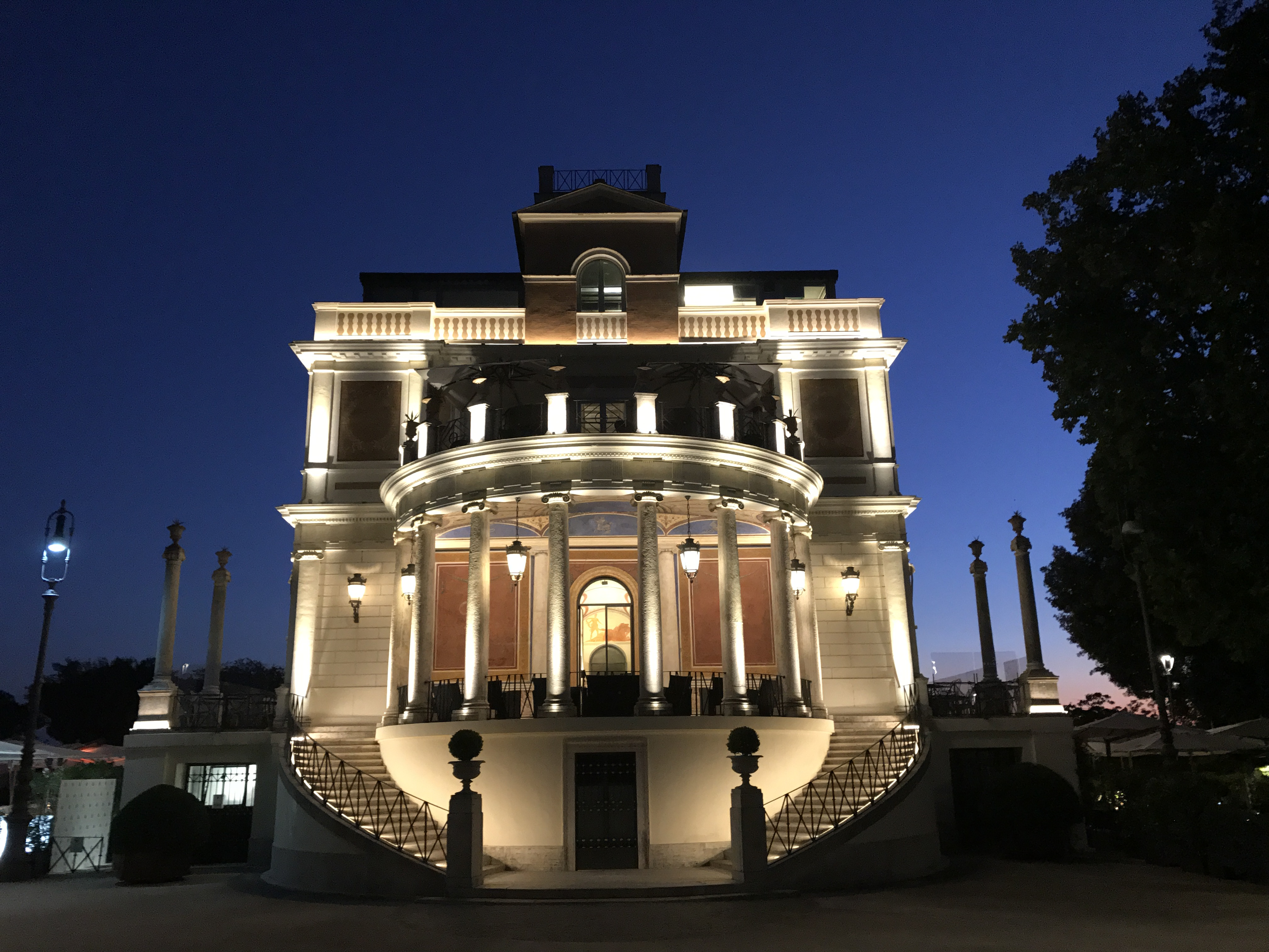 CASINA VALADIER NIGHT LIGHT